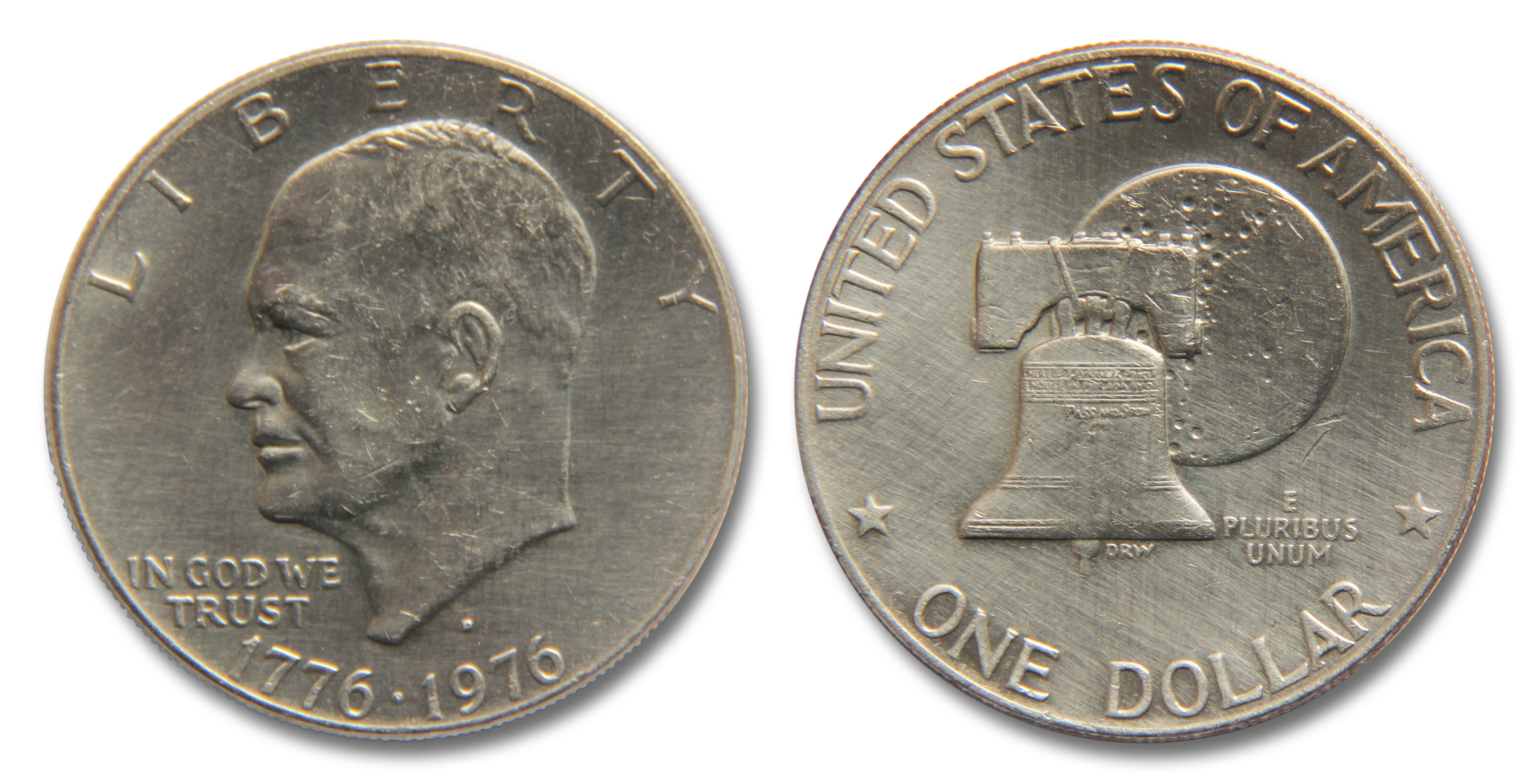 Sog. Eisenhower-Dollar "Typ II" mit Rückseite zur 200 Jahr -Feier. Neue Version mit neutralem/weißen Hintergrund und geändertem Schatten.